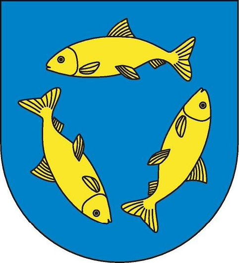 Herb gminy Chrzypsko Wielkie